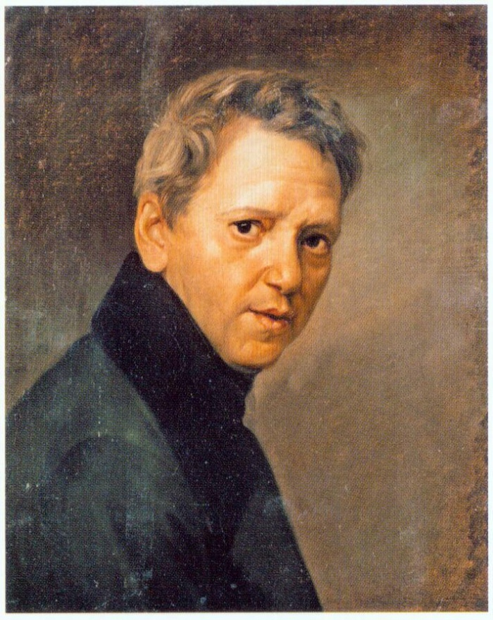 Василий Степанович Добровольский (1787—1855) - русский художник, академик Петербургской Академии Художеств